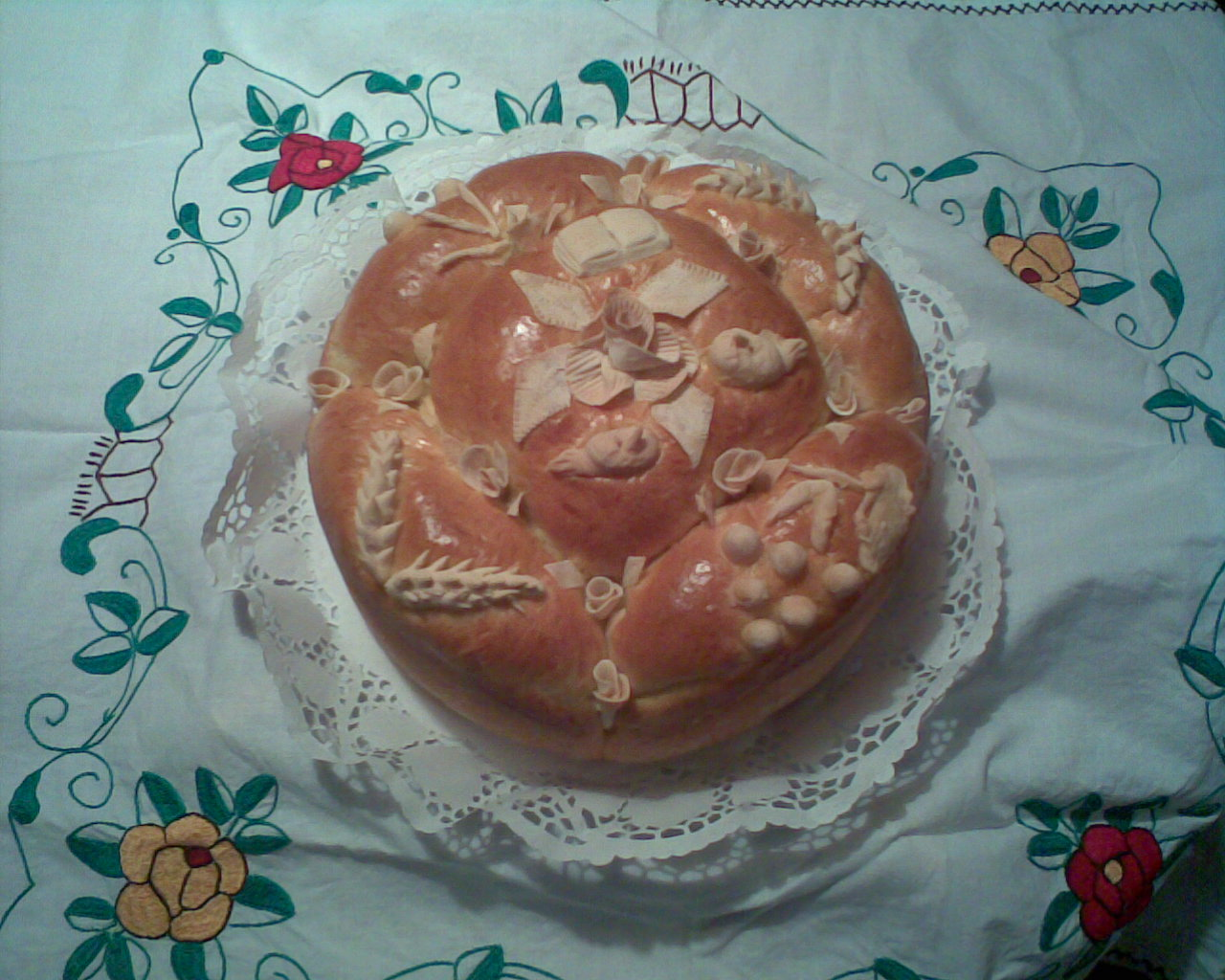 Slavski kolač (literally "Slava cake")